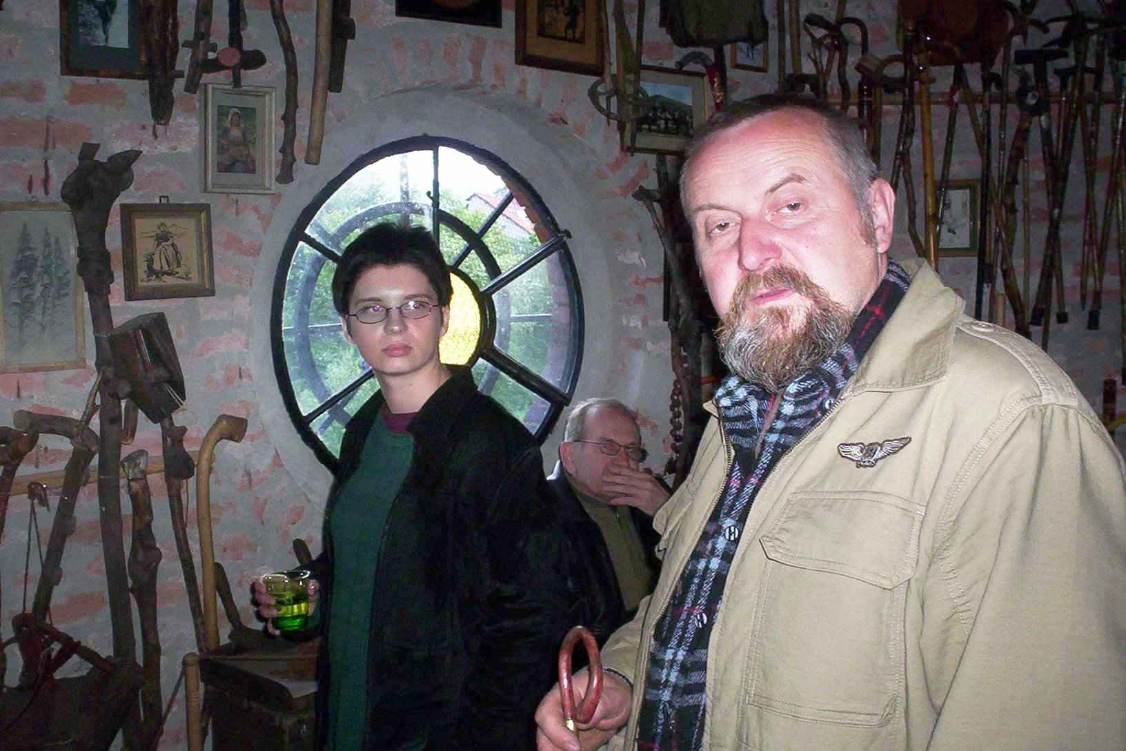 Jerzy Jakubów